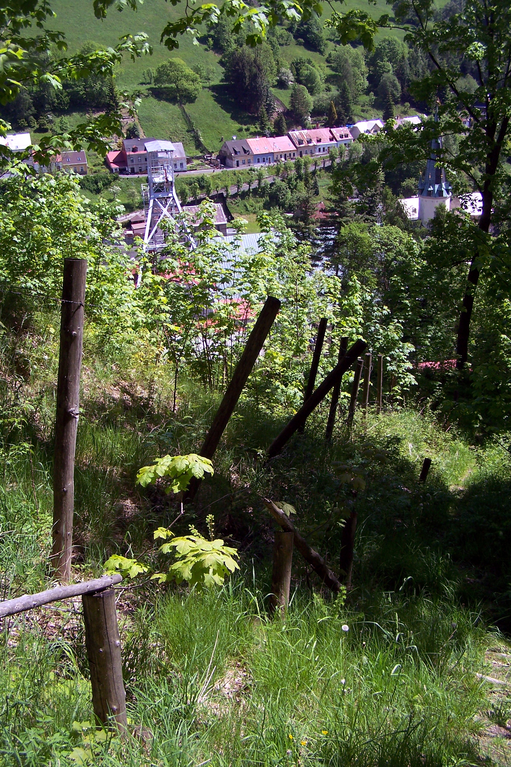 Tzv. Mauthausenské schody na tábor Svornost